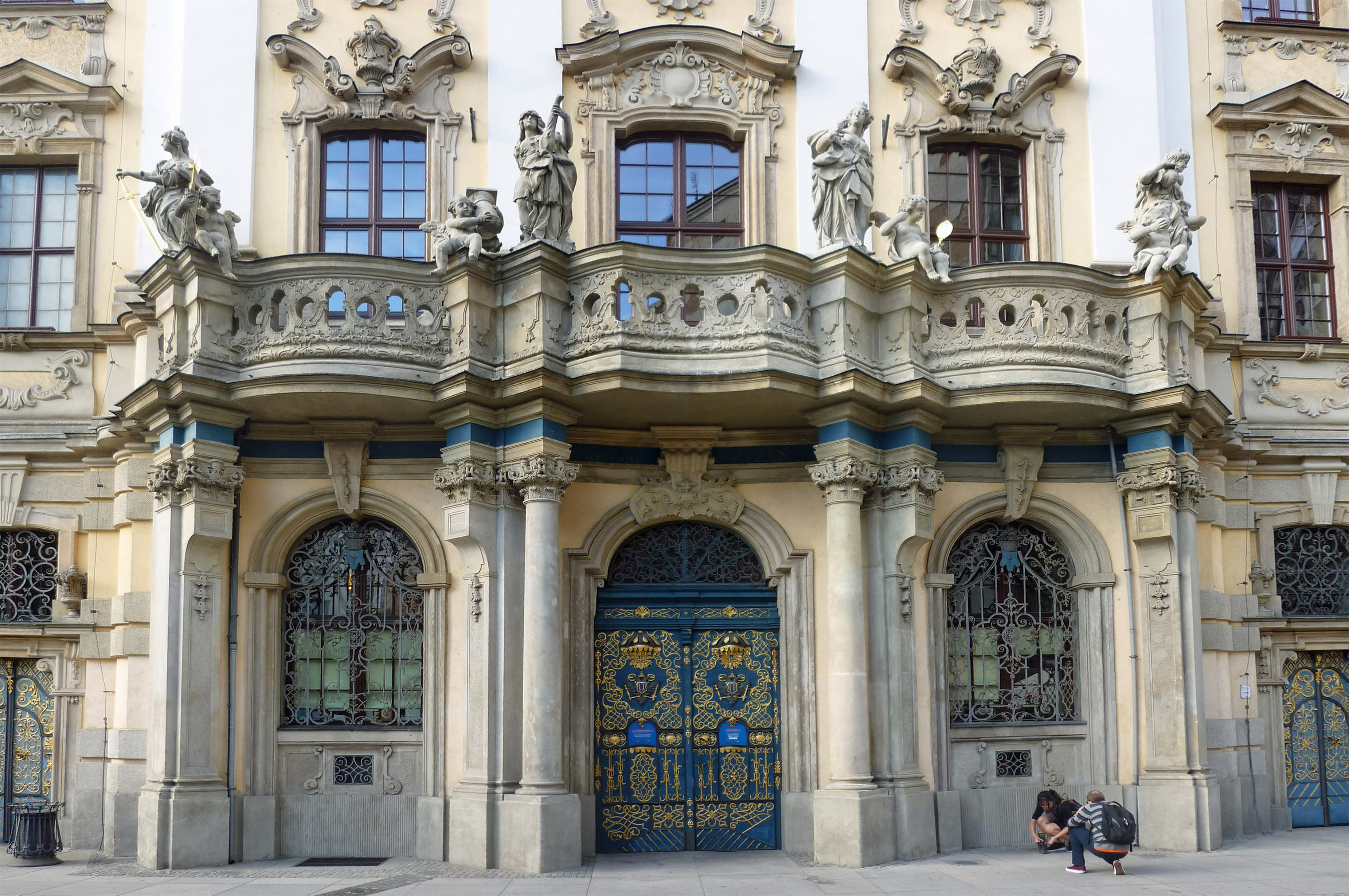 Portal an der Breslauer Universität